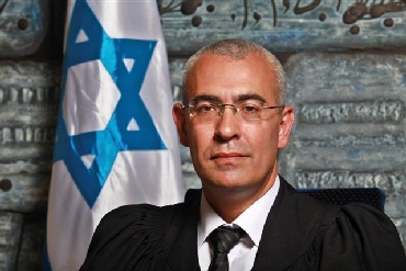 Ofer Grosskopf